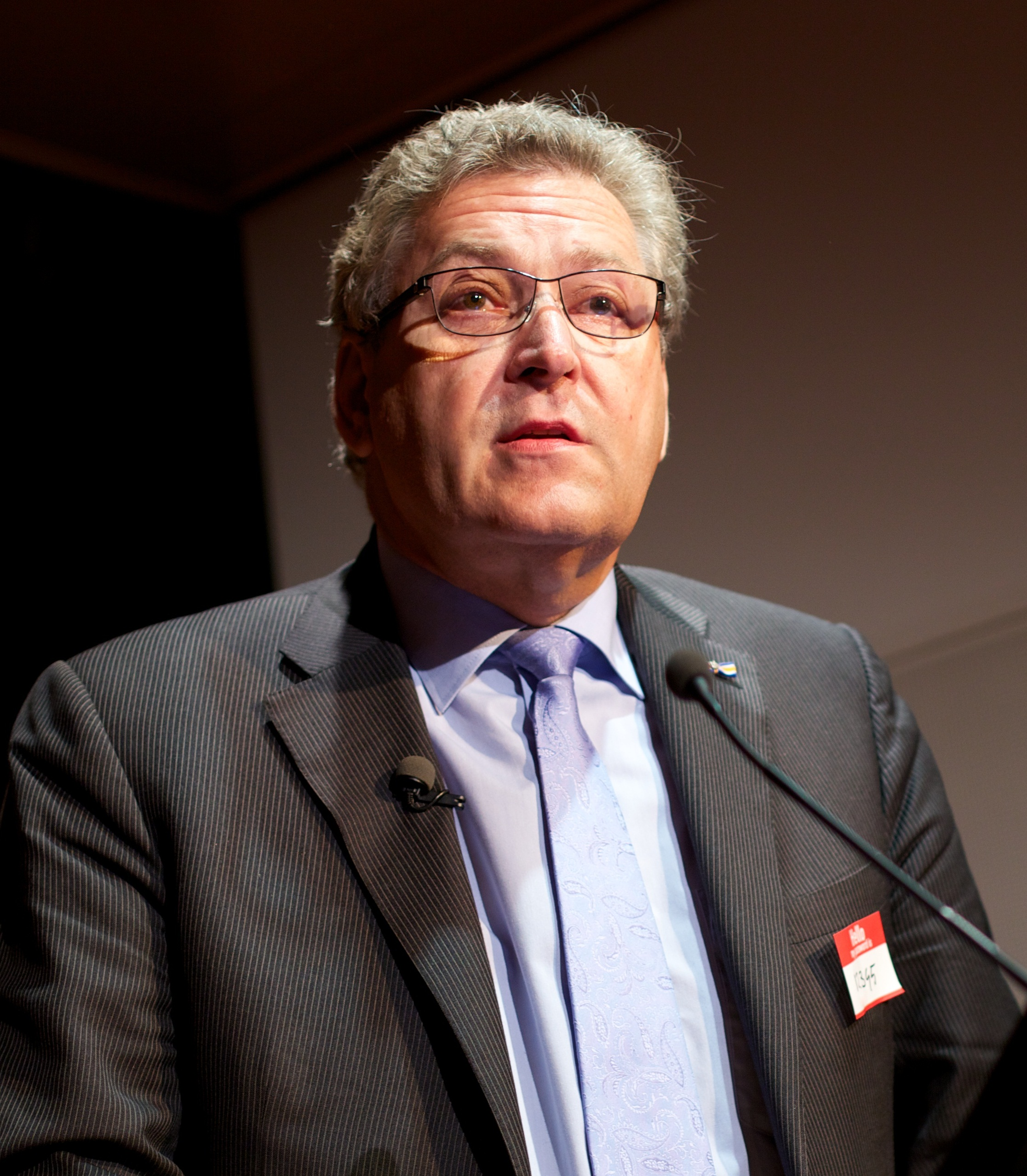 Henk Krol (Tilburg, 1 april 1950) is een Nederlandse journalist, ondernemer en politicus.